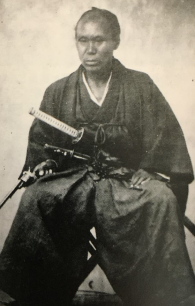 佐藤与之助政養の肖像写真。